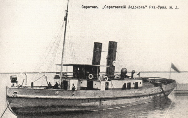 Речной ледокол Рязано-Уральской железной дороги «Саратовский ледокол», на Волге вблизи Саратова. Изображение с дореволюционной открытки. Издатель неизвестен.